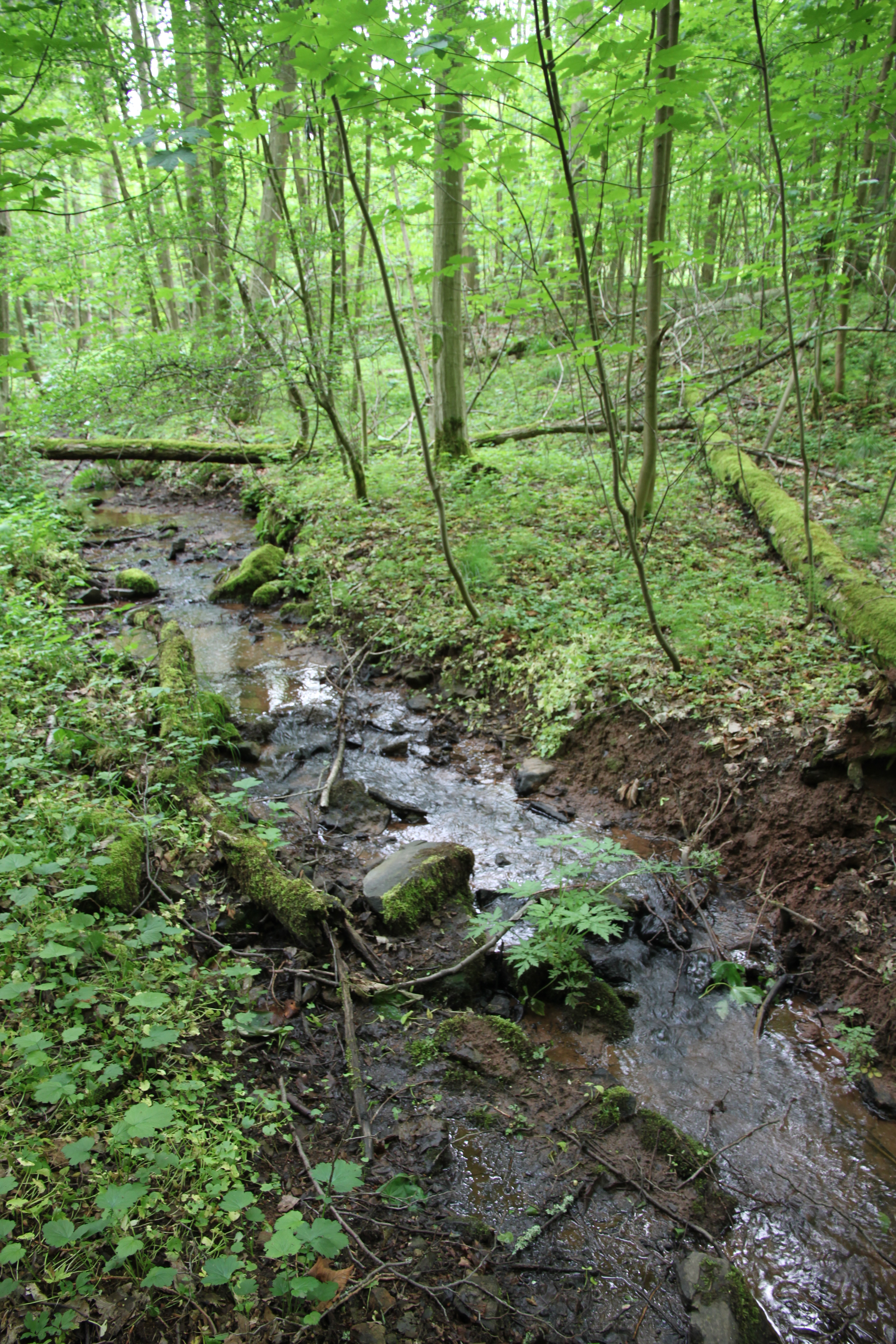 Svinský potok, přítok Stěnavy v okrese Náchod.